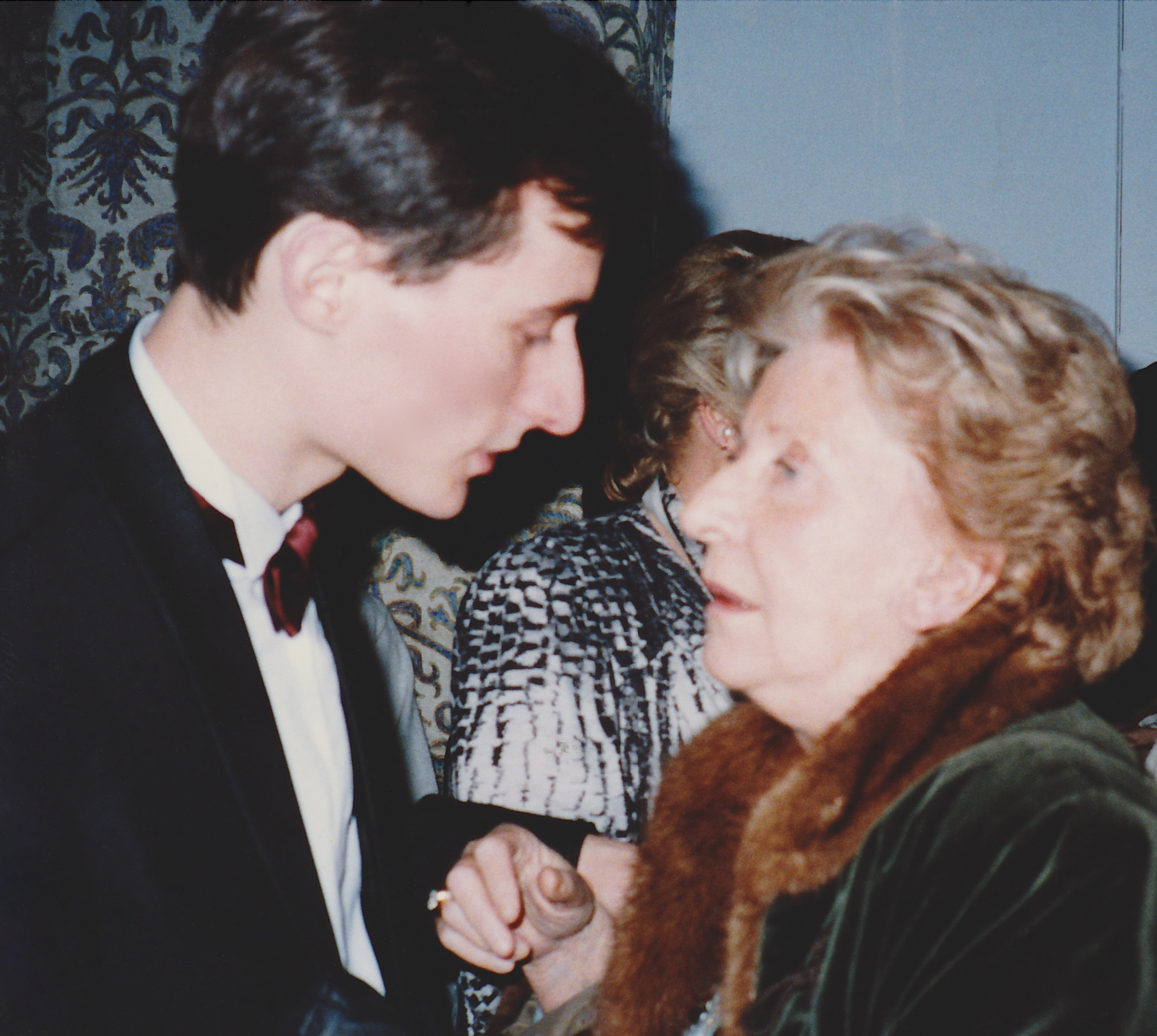 François Weigel et Eliane Richepin après un concert Salle Gaveau en 1989